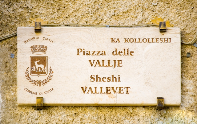 Le vallje sono danze e canti con cui gli albanesi di Calabria rievocano le gesta dell'eroe albanese Giorgio Castriota Scanderbeg. I canti sono di solito cori accompagnati da più strumenti musicali. Il ballo, la vallja, è costituita da una "catena" di Arbëreshë che si tengono per mano o legati da un fazzoletto colorato, cantano e ballano. La vallja si sposta sempre, come un drappello di soldati in battaglia. I balli si snodano nelle vie del paese e terminano nella "piazza delle vallje". Wikipedia: Civita; Parco Nazionale del Pollino. Wikipedia: Giorgio Castriota Scanderbeg; Arbëreshë